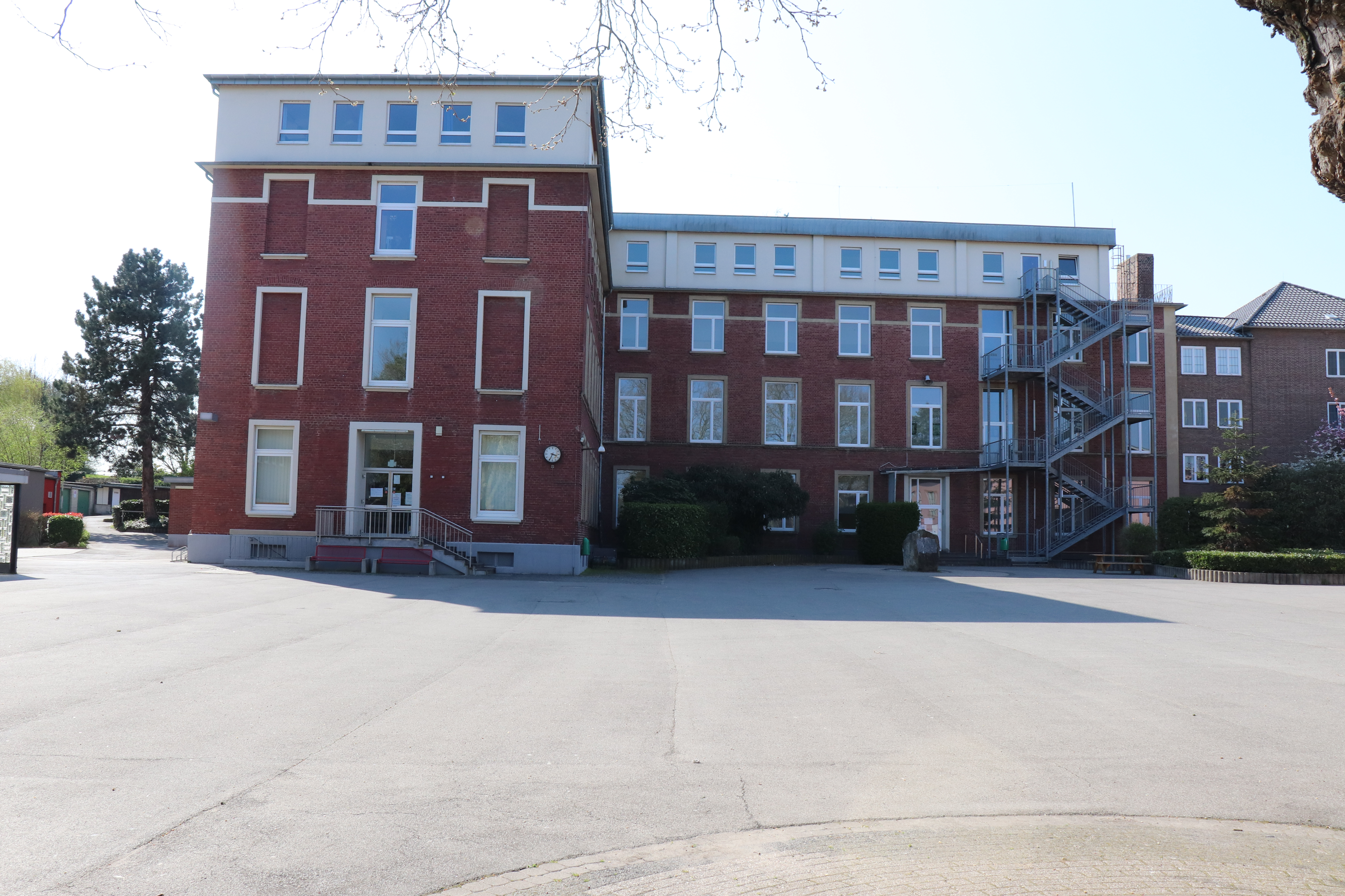 Das 1913 erbaute Schulgebäude.